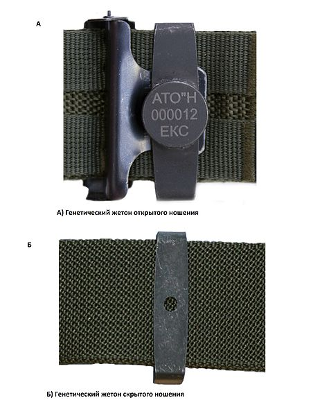 Модифiкацiя жетонiв